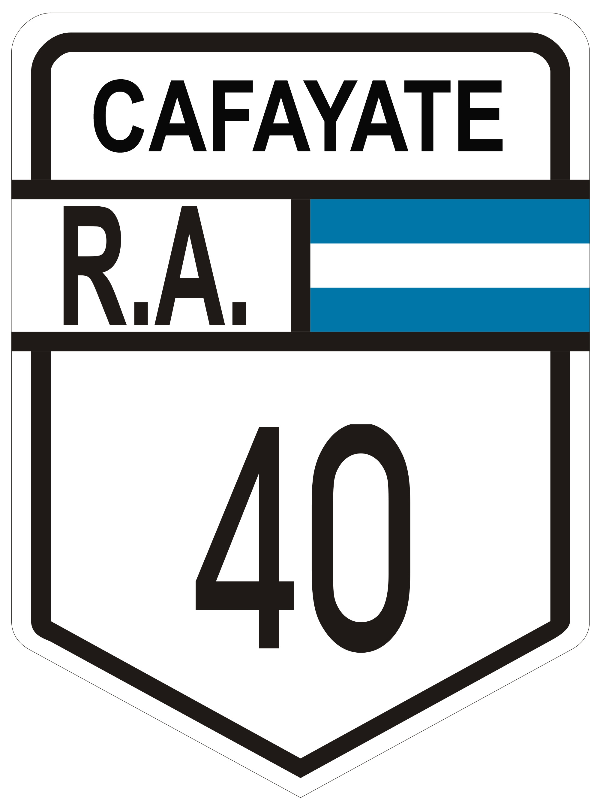 Cafayate - RN40